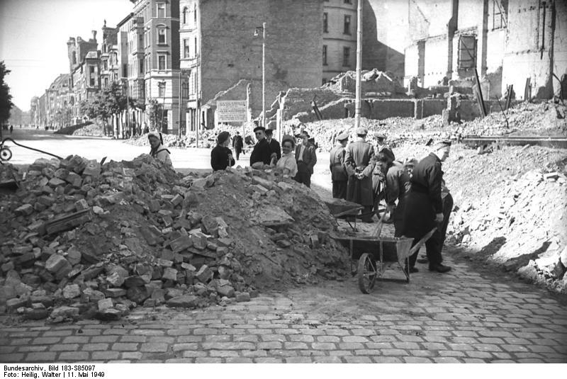 Illus/Heilig Berlin: Überall an den Übergangsstellen vom sowjetischen in die Westsektoren werden seit heut Vormittag (11.5.49) die Strassensperren beseitigt. UBz: Beseitigung der Straßensperren in der Kommandantenstrasse 3234-49